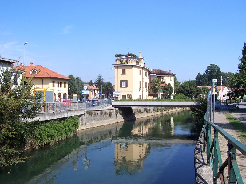 Villa Fornaci (MI) - Naviglio Martesana